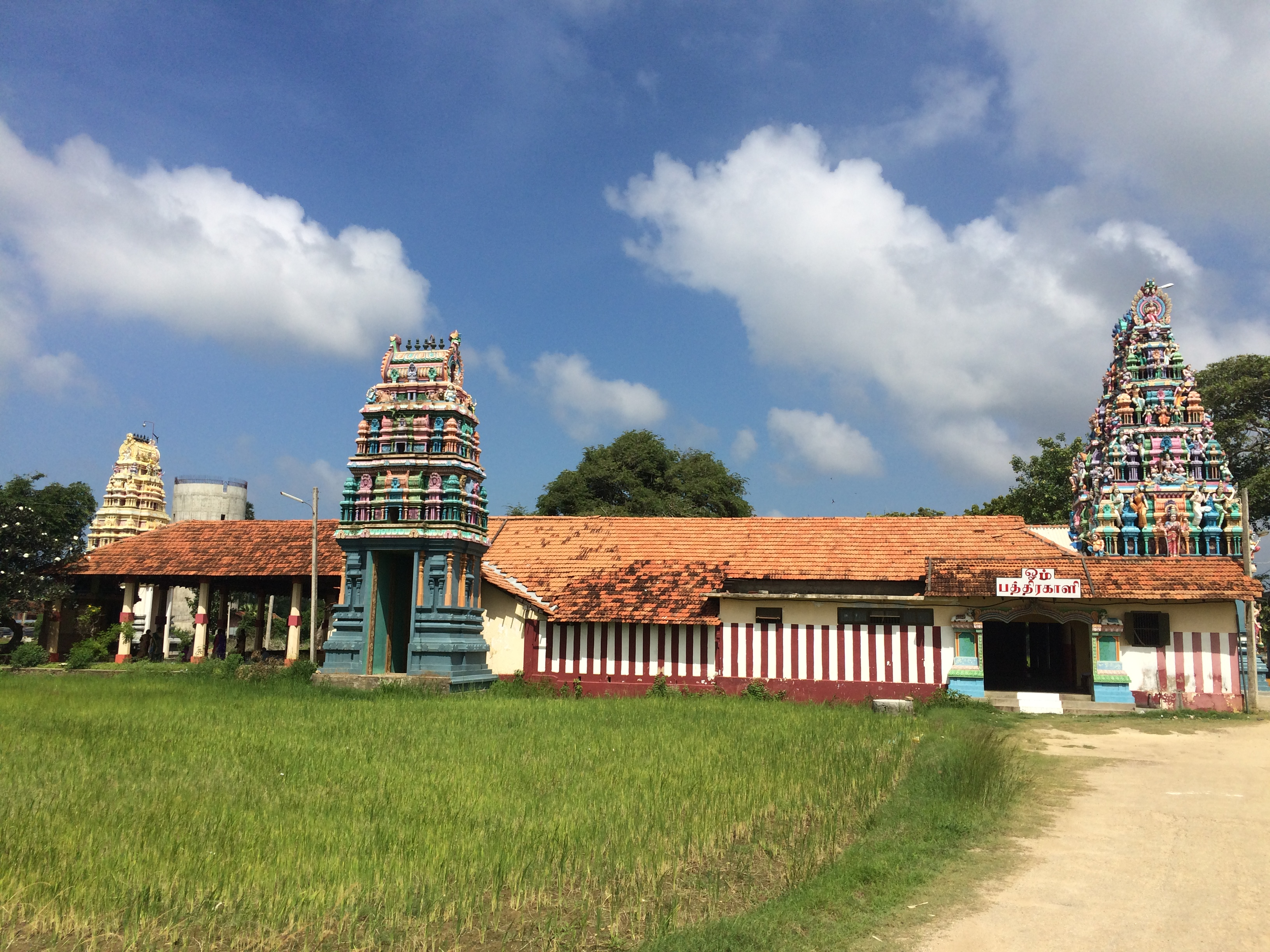 மாகாணம் - வட மாகாணம் மாவட்டம் - யாழ்ப்பாணம் இடம் - சங்கரத்தை